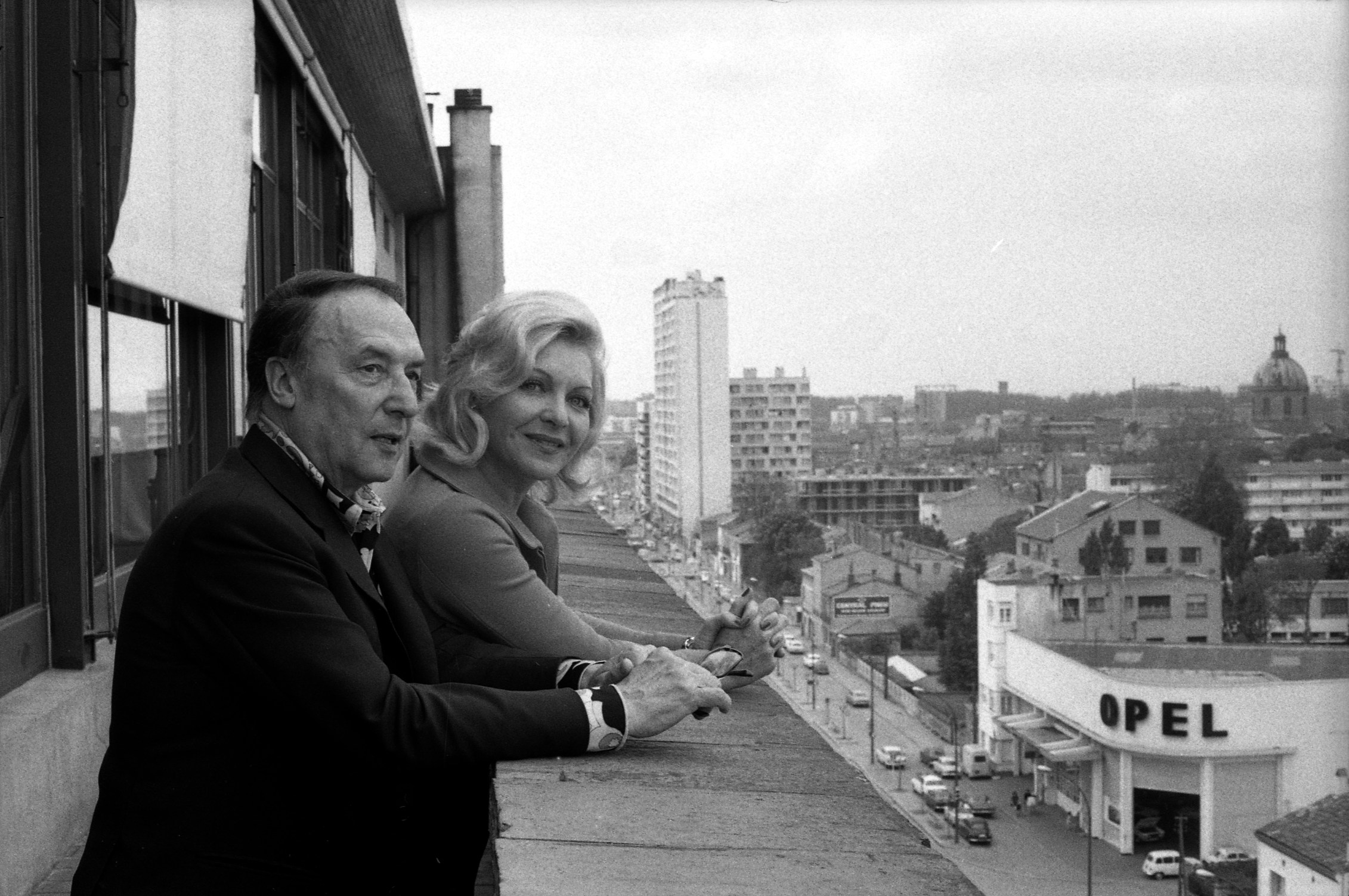 Extèrieur avec vue sur les toits de Toulouse. Le 5 mai 1972. Plan rapproché de Loulou Gasté (compositeur de chansons) en premier plan et de sa femme, Line Renaud accoudée au balcon extèrieur d'un immeuble.